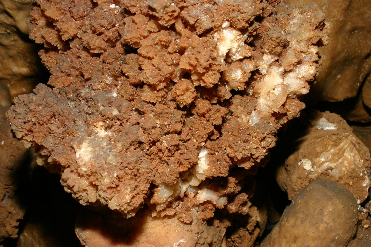 Binghöhle bei Streitberg